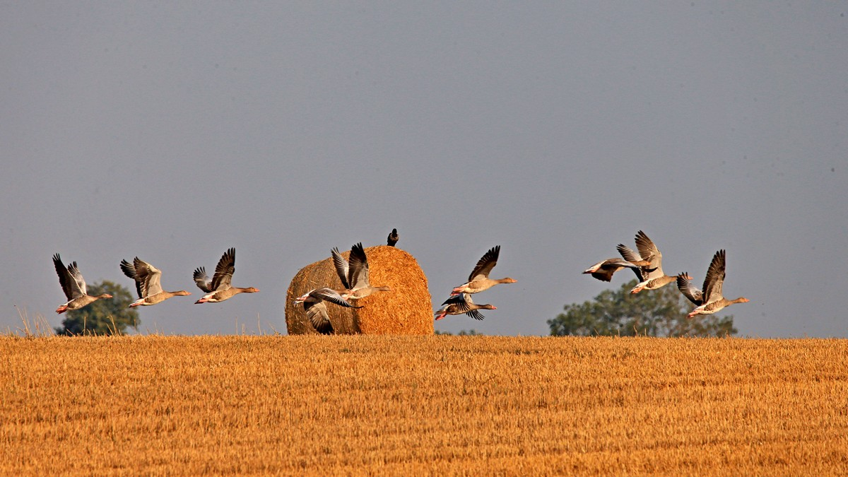 Graugänse über einem abgeernteten Getreidefeld im Mecklenburg